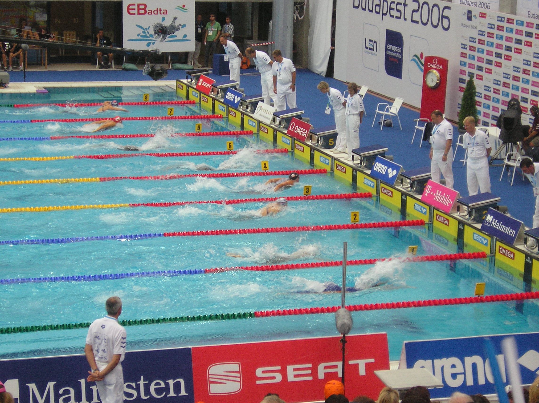 Halve finale 100 meter vlinderslag vrouwen tijdens het EK Zwemmen 2006 in Boedapest. Inge Dekker (Ned) in baan 4.